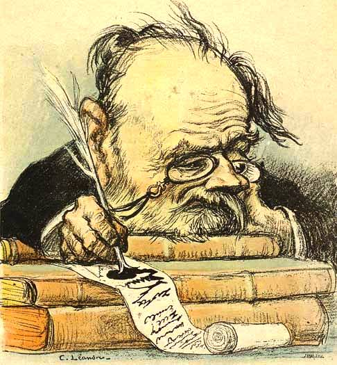 Caricature de Zola par Charles Léandre, Le Rire, 20 novembre 1897.